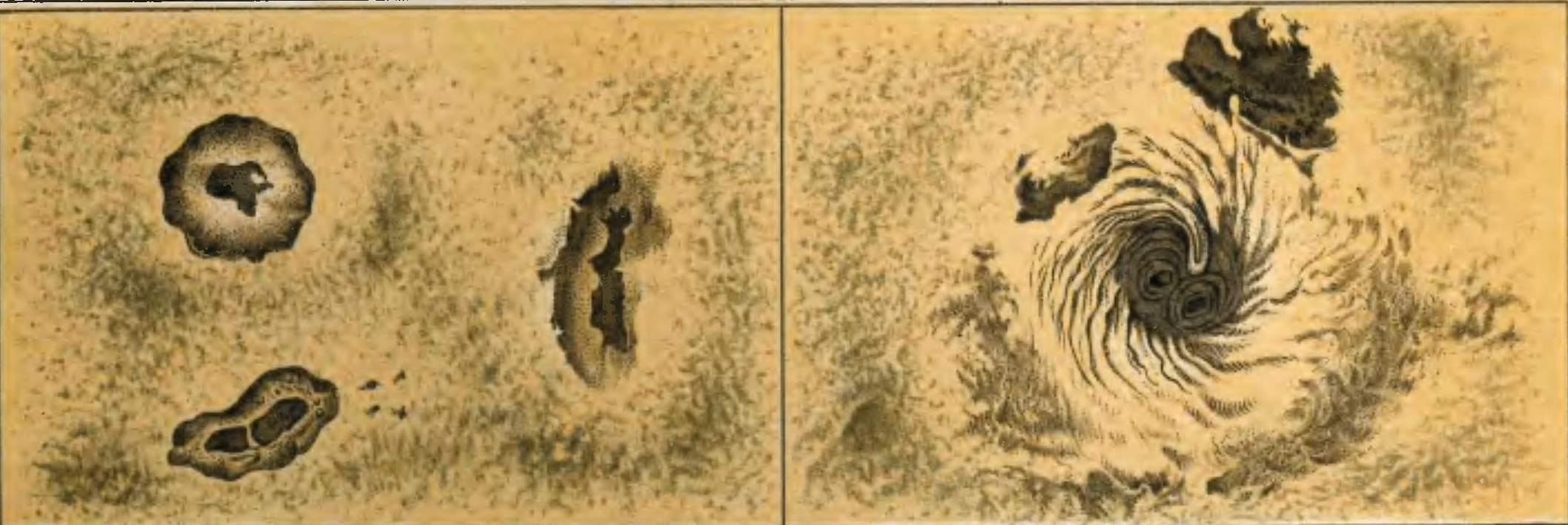 Didascalia originale: Solite forme delle macchie solari minori. Struttura d'una macchia solare spiriforme (6 maggio 1857).